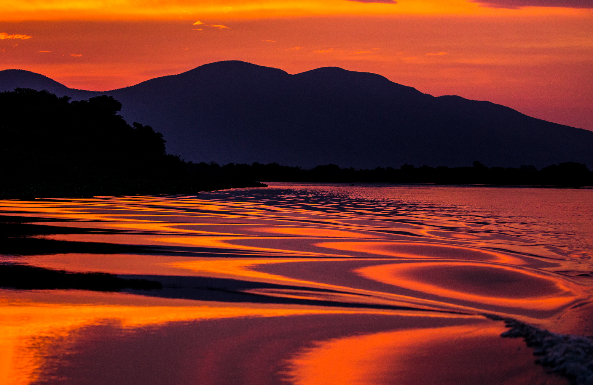 por do sol pantanal